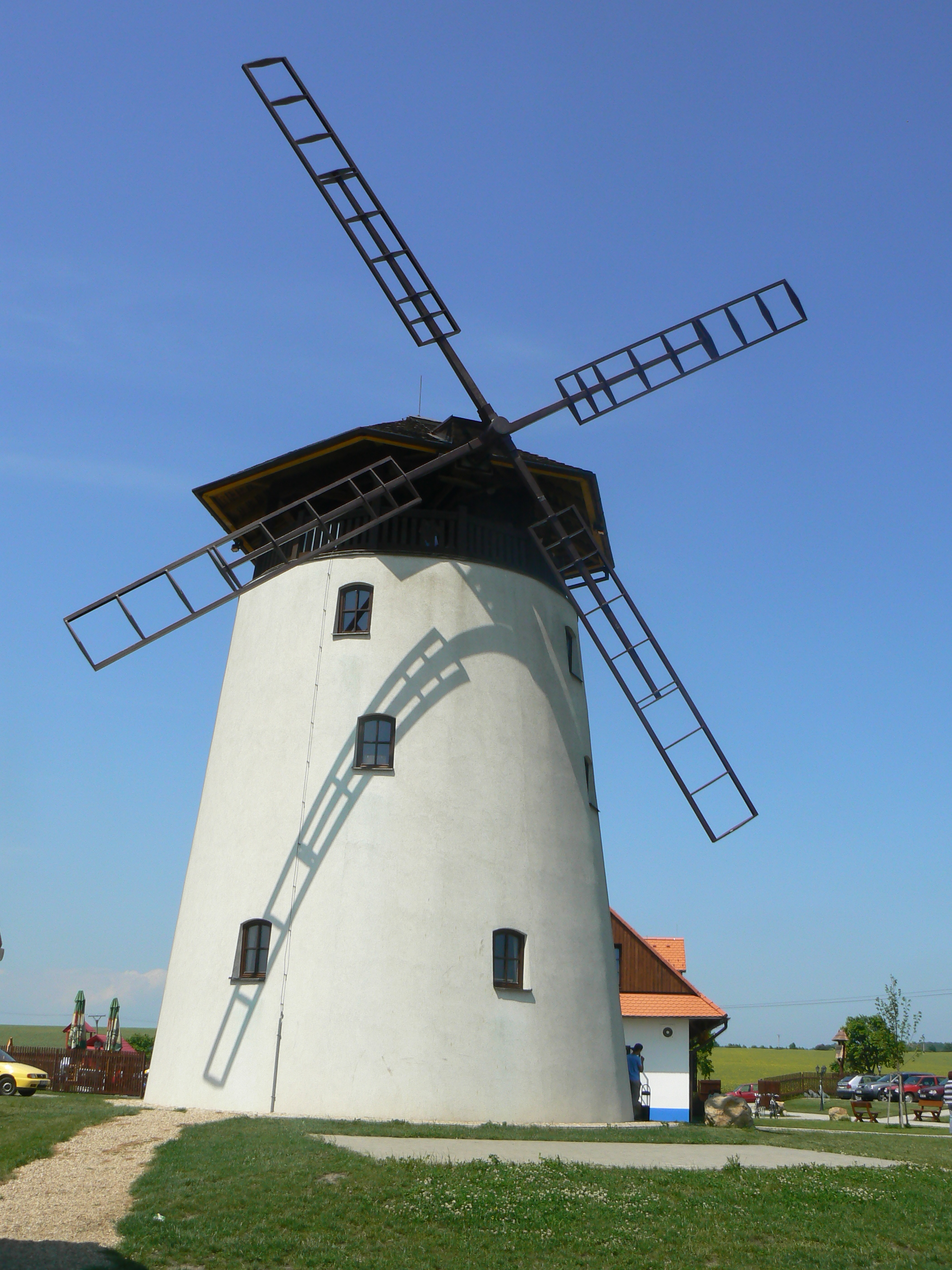 Rozhledna Bukovanský mlýn.